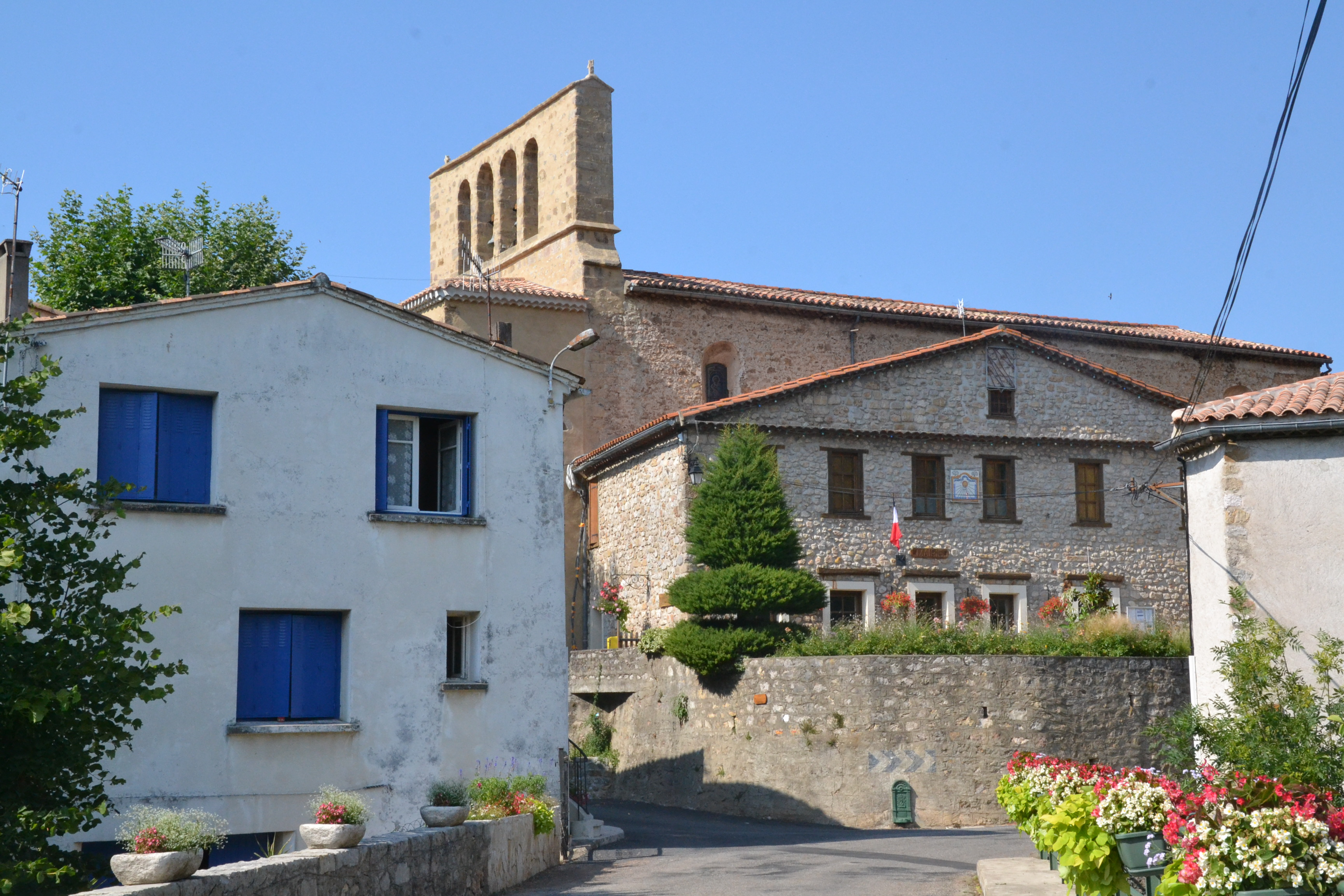 Le village de Brenac, commune de Quillan (Aude, France).